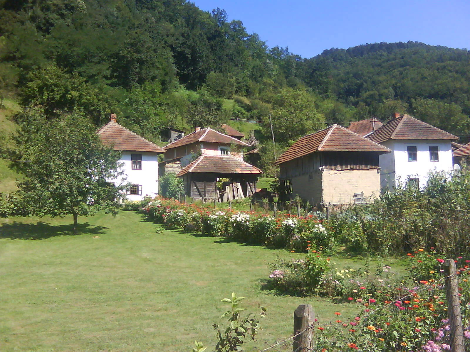 Пример изгледа насеља на подручју Левча (Дулене) Аутор:Ненад